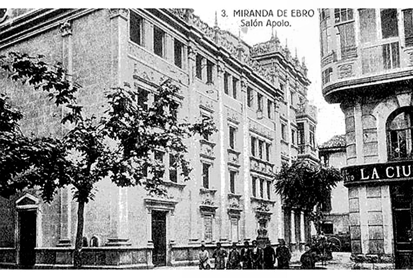 Teatro Apolo de Miranda de Ebro (España)